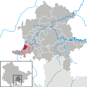 Meuselbach-Schwarzmühle in Thuringia - District Saalfeld-Rudolstadt